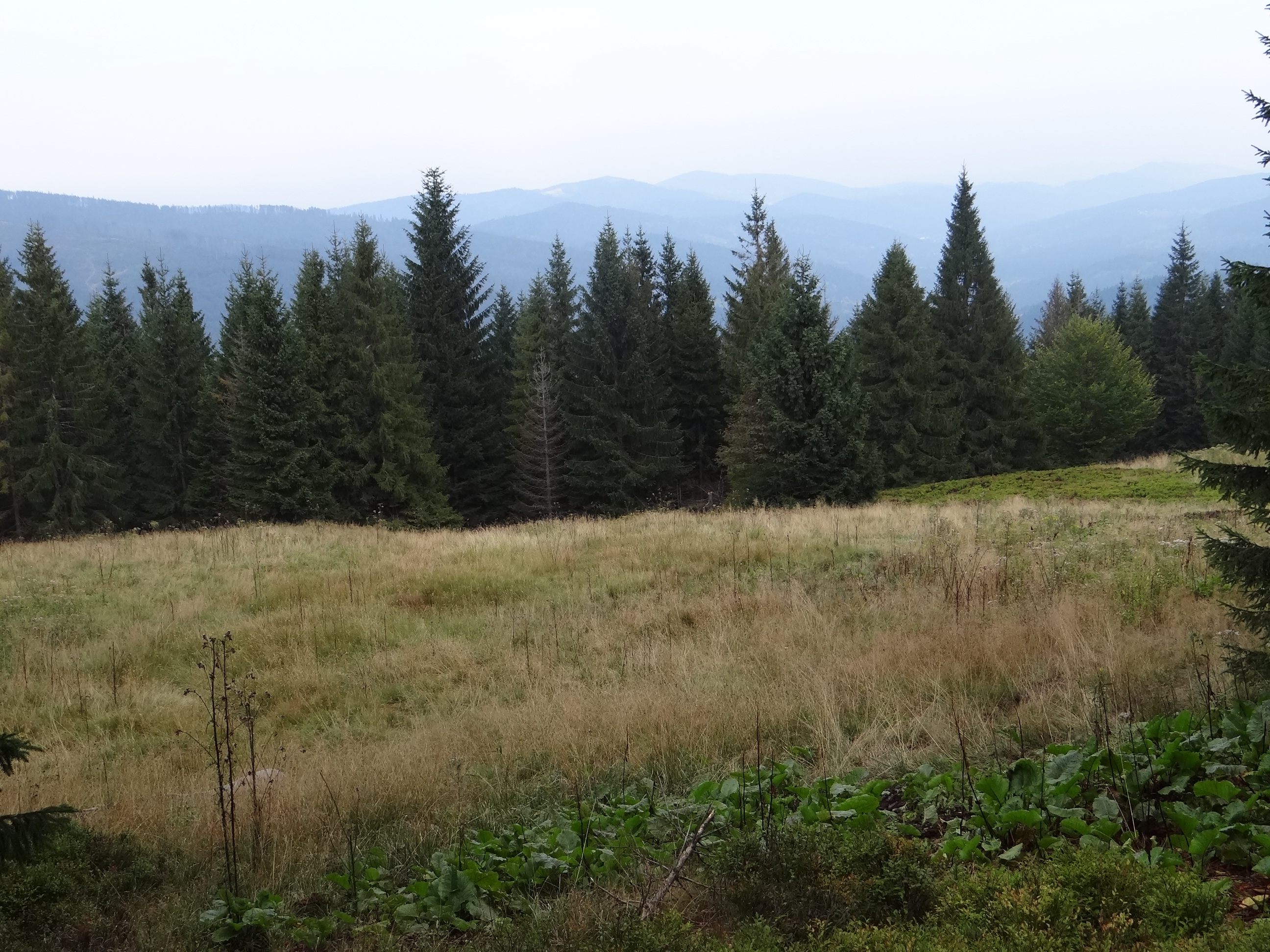 Czarna Hala w Babiogórskim Parku Narodowym